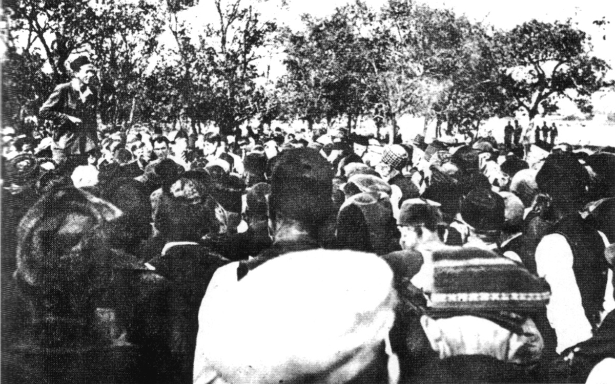 Srpskohrvatski / српскохрватски: Drug Mijalko Todorović Plavi govori narodu u Bosni, posle Bitke na Sutjesci.